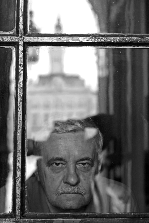 Végel László (Szenttamás, 1941. február 1. –) Kossuth-díjas író, drámaíró, esszéista.